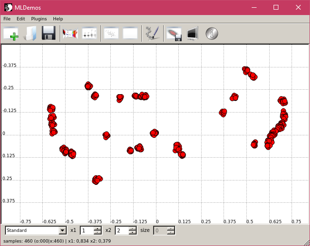 Avec un serveur X sous Windows, les fonctions graphiques sont utilisables (ici, les démos d'apprentissage automatique mldemos des dépôts Ubuntu).